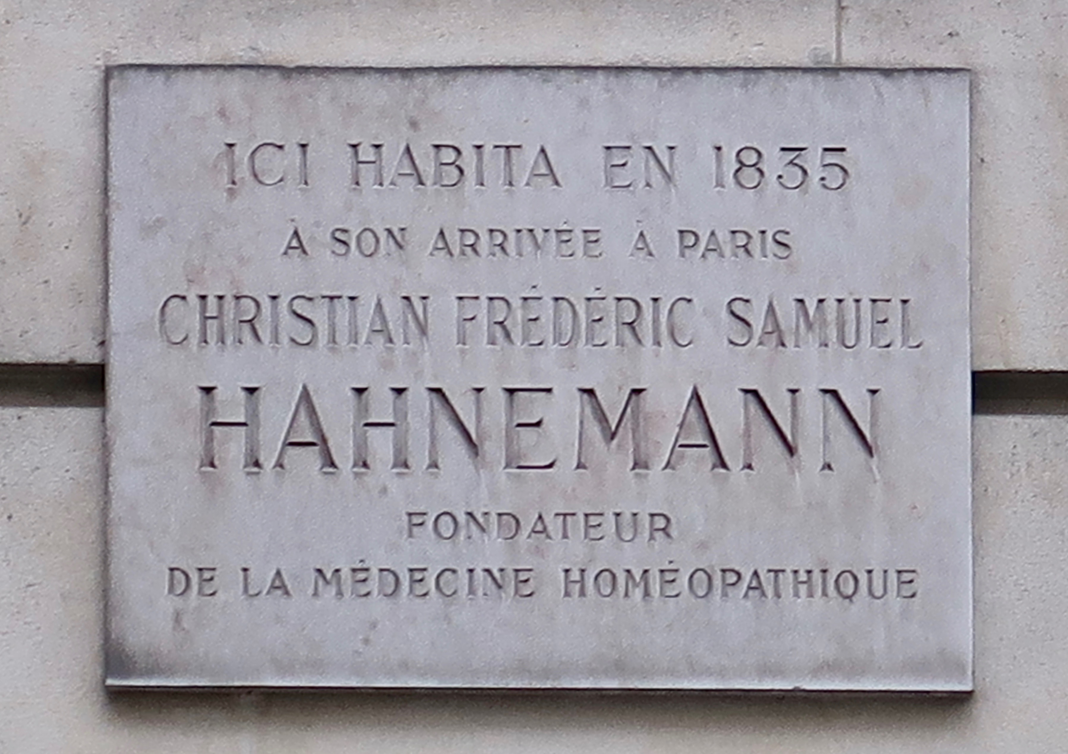 Plaque en hommage à Samuel Hahnemann, 26 rue des Saints-Pères (Paris, 7e).